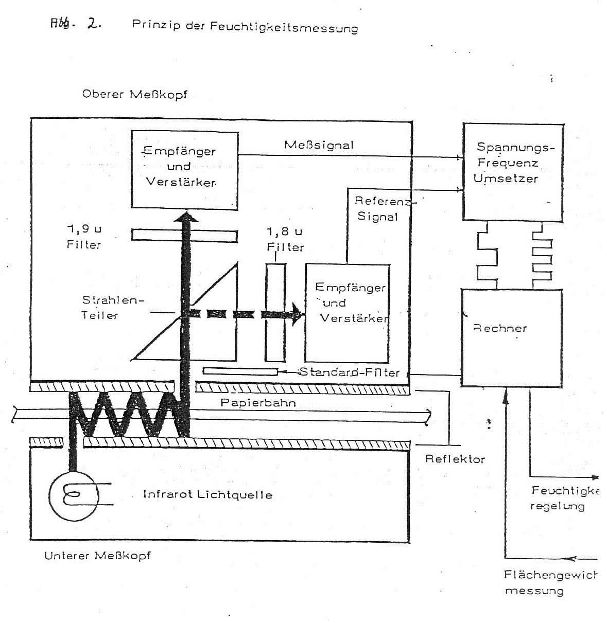 schematische Darstellung der Feuchtemessung an einer Papiermaschine